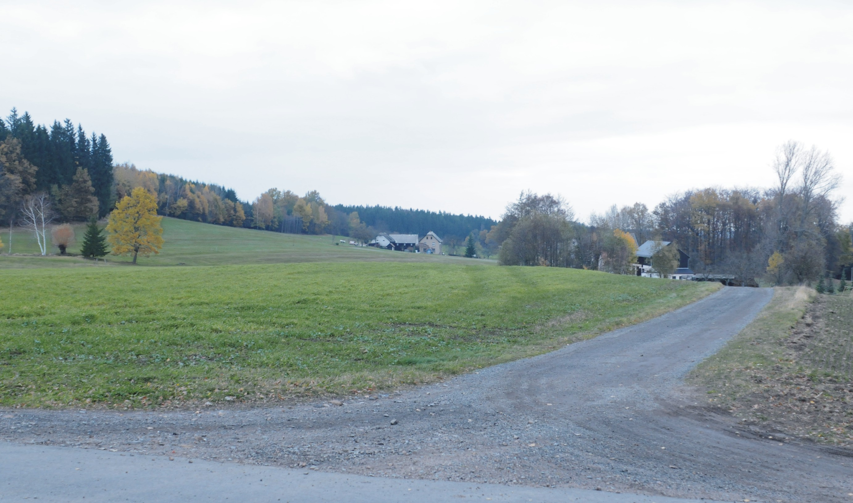 Lauterholz, Ortsteil von Lauterhofen in der Gemeinde Crinitzberg (Sachsen, Deutschland)